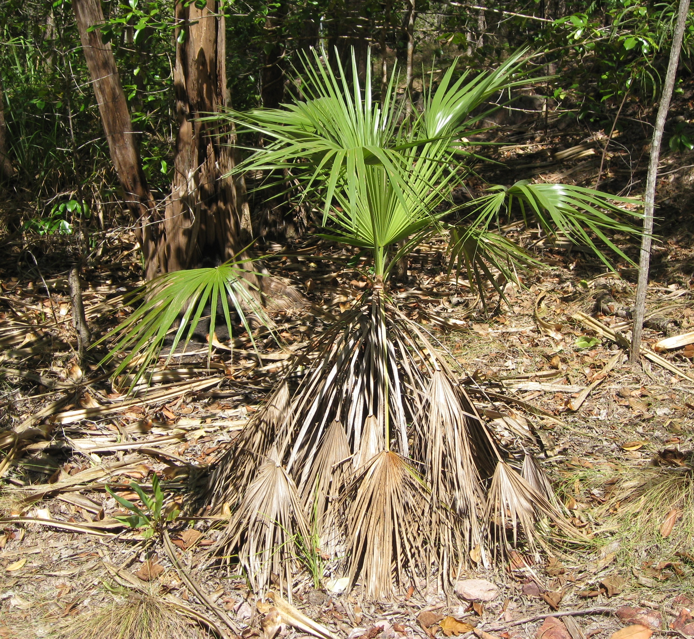 Livistona humilis Sand Palm